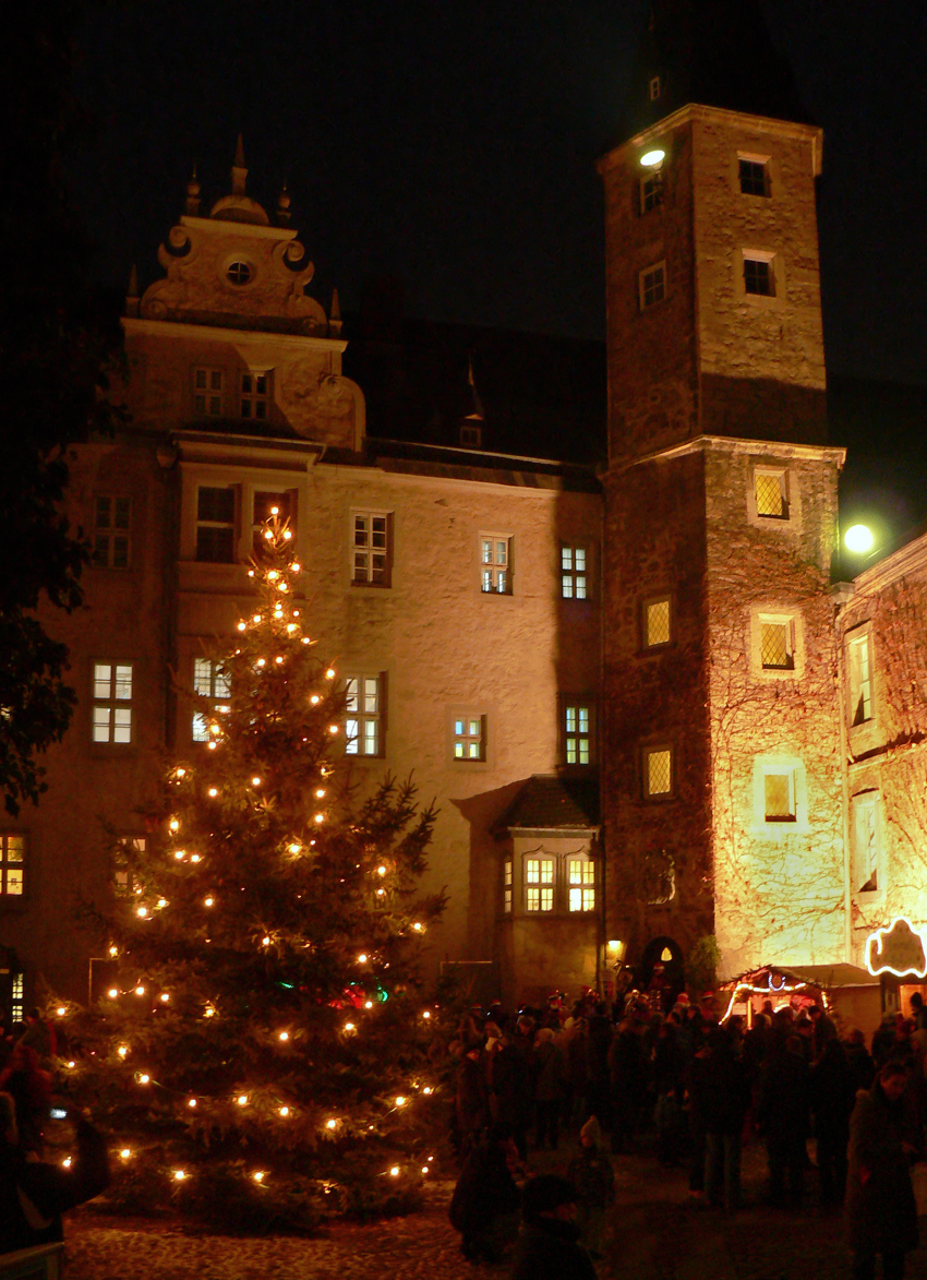 Weihnachtsmarkt in Schloss Wolfsburg